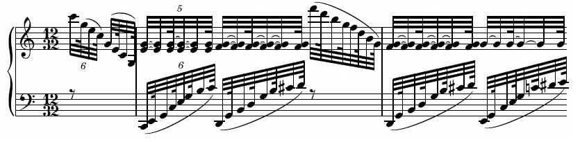 Description : troisième variation de l'arietta de la sonate pour piano n° 32 de Beethoven Auteur : propre travail réalisé avec Lilypond Licence : domaie public (auteur décédé depuis plus de 70 ans)